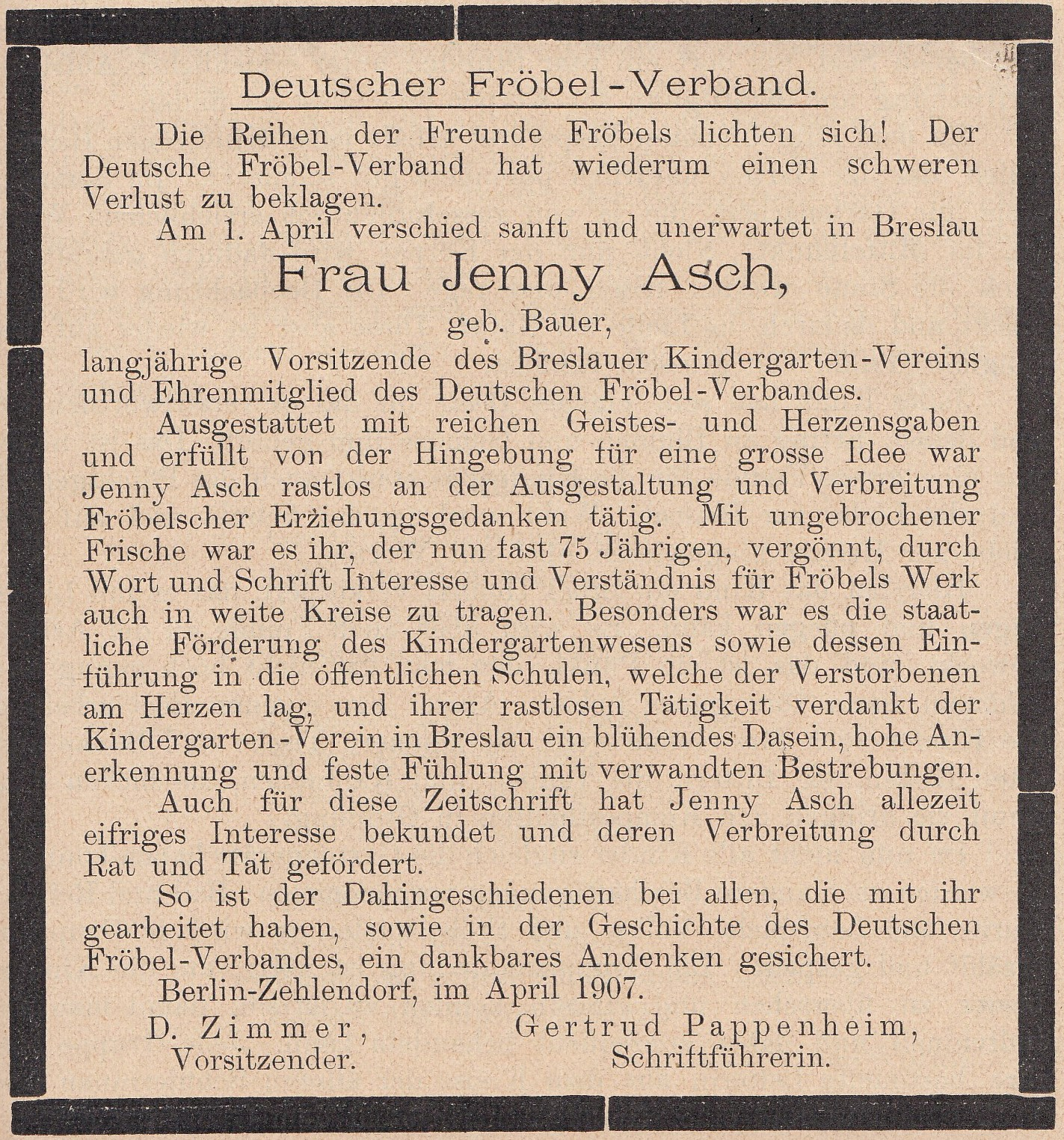 Todesanzeige Jenn asch